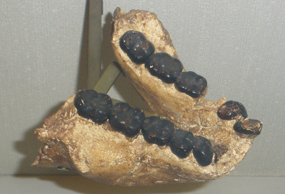 Fossil of Gigantopithecus, an extinct mammal - Took the picture at Museo di Paleontologia di Firenze